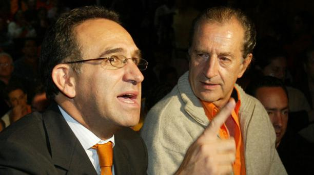 Ramiro González junto a Rodrigo Borja durante su período como prefecto de Pichincha en 2004